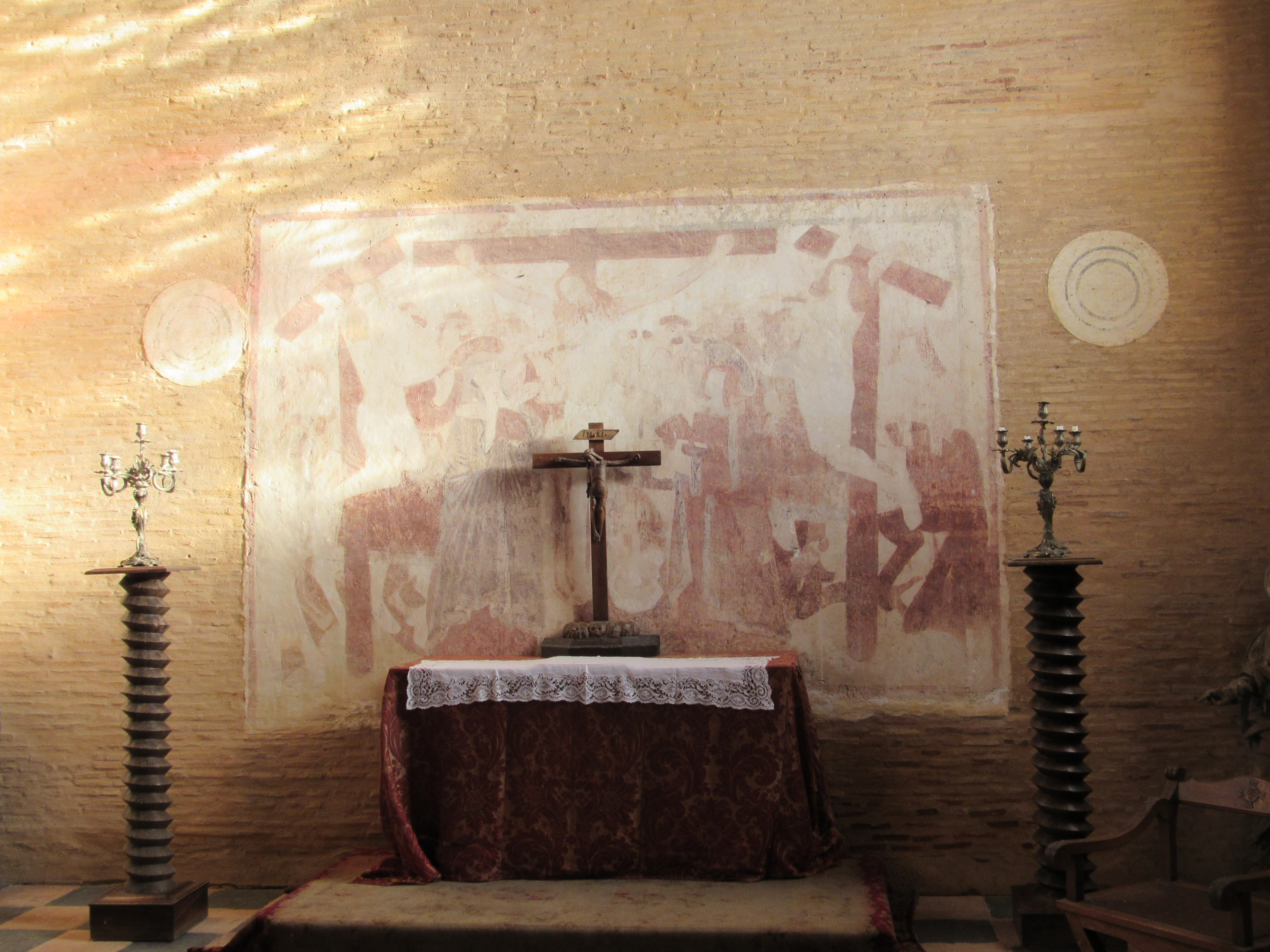 Fresque de la chapelle de la Motte-Glain représentant une crucifixion.